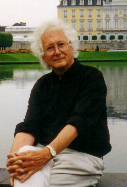 Schriftsteller Walter Neumann vor Schloss Augustusburg